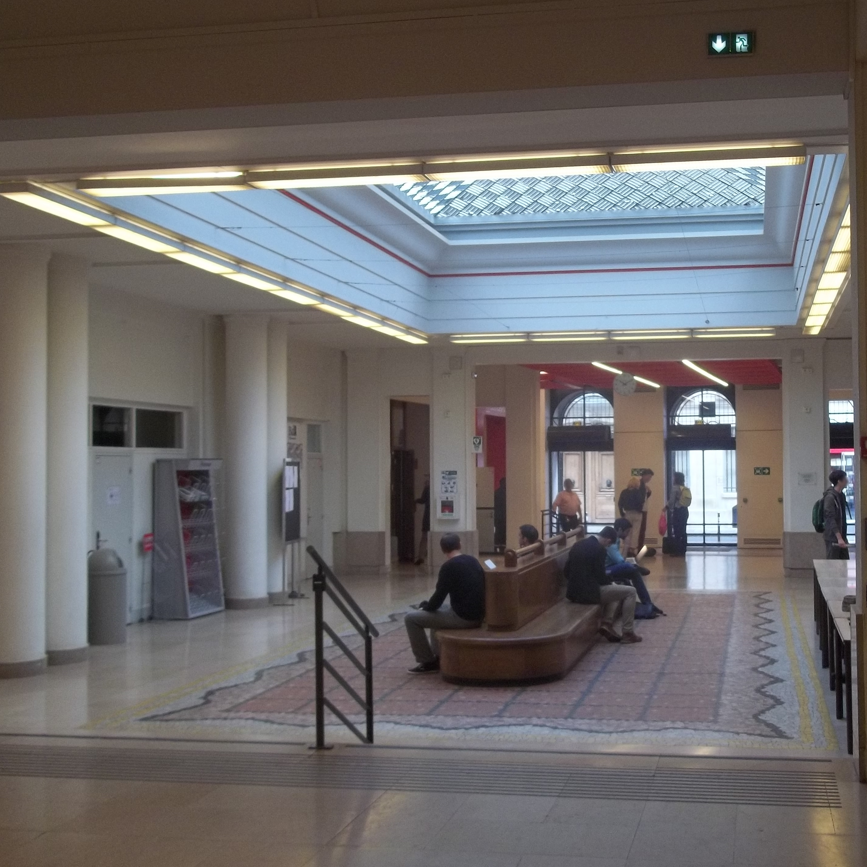 Le hall principal de Sciences Po et sa "péniche"